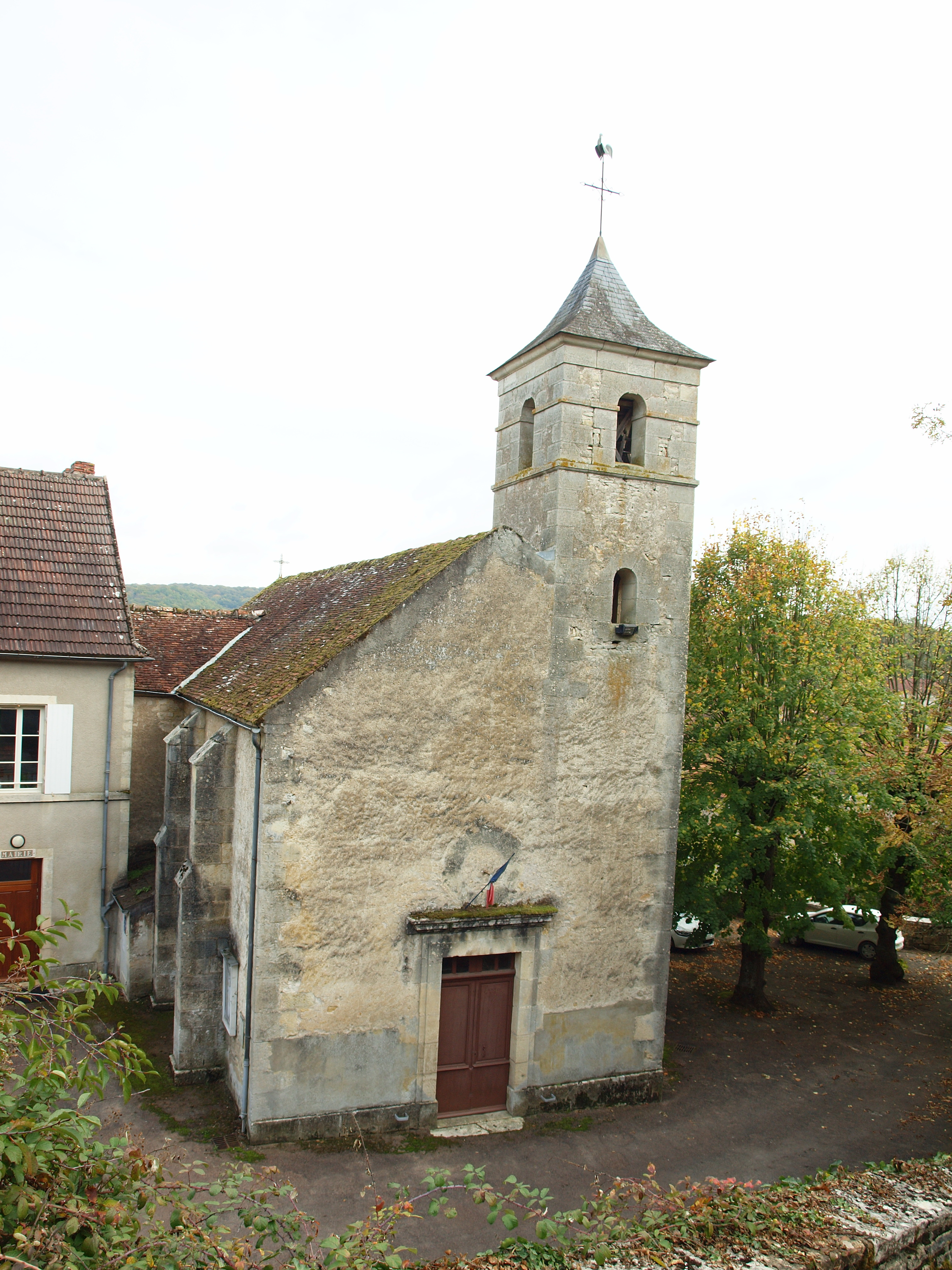 Chevroches (Nièvre, France)